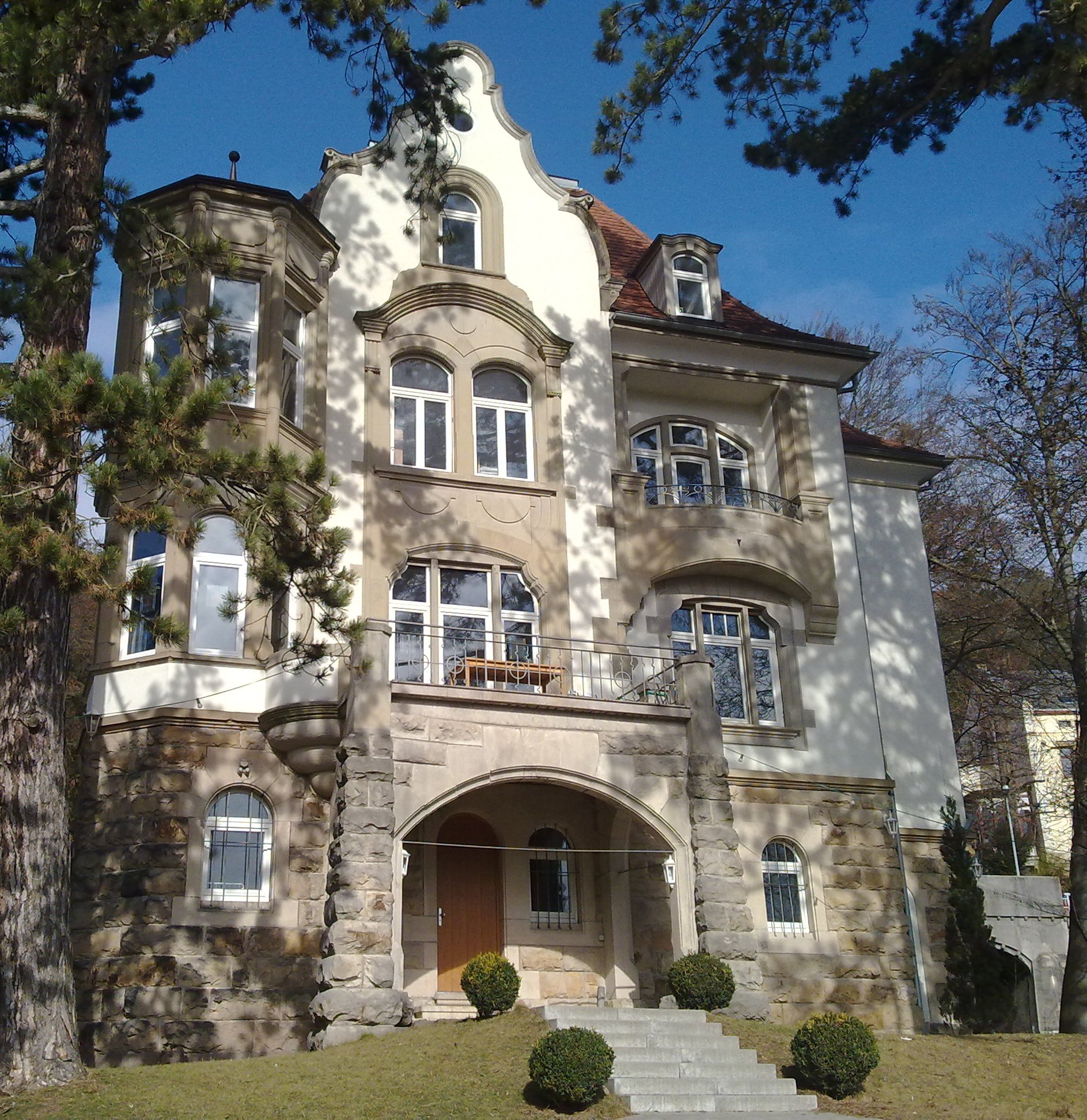 Verbindungshaus Alte Straßburger Burschenschaft Germania zu Tübingen, Blick auf die Neckarseite